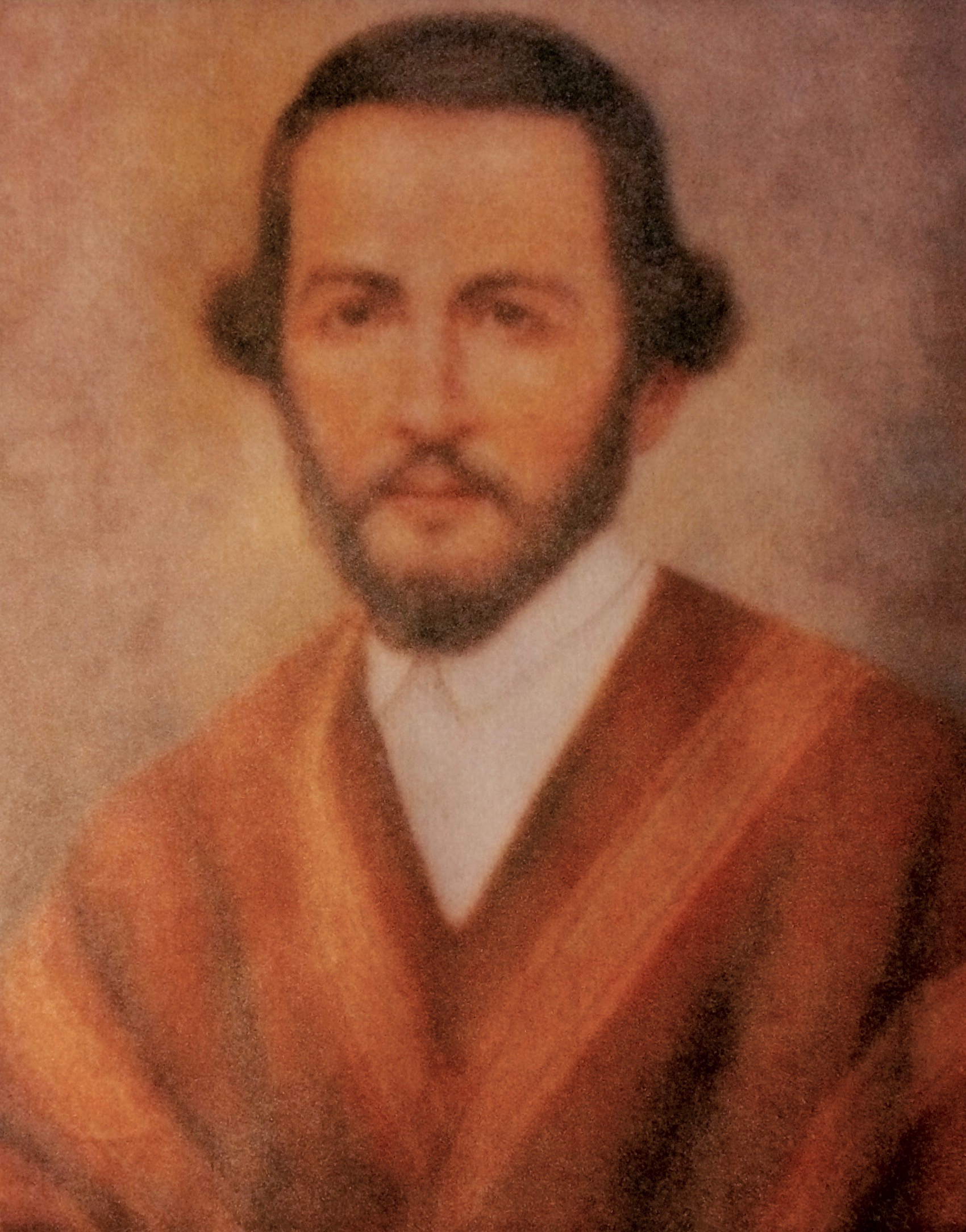 Estampa del fundador de Sonsón.